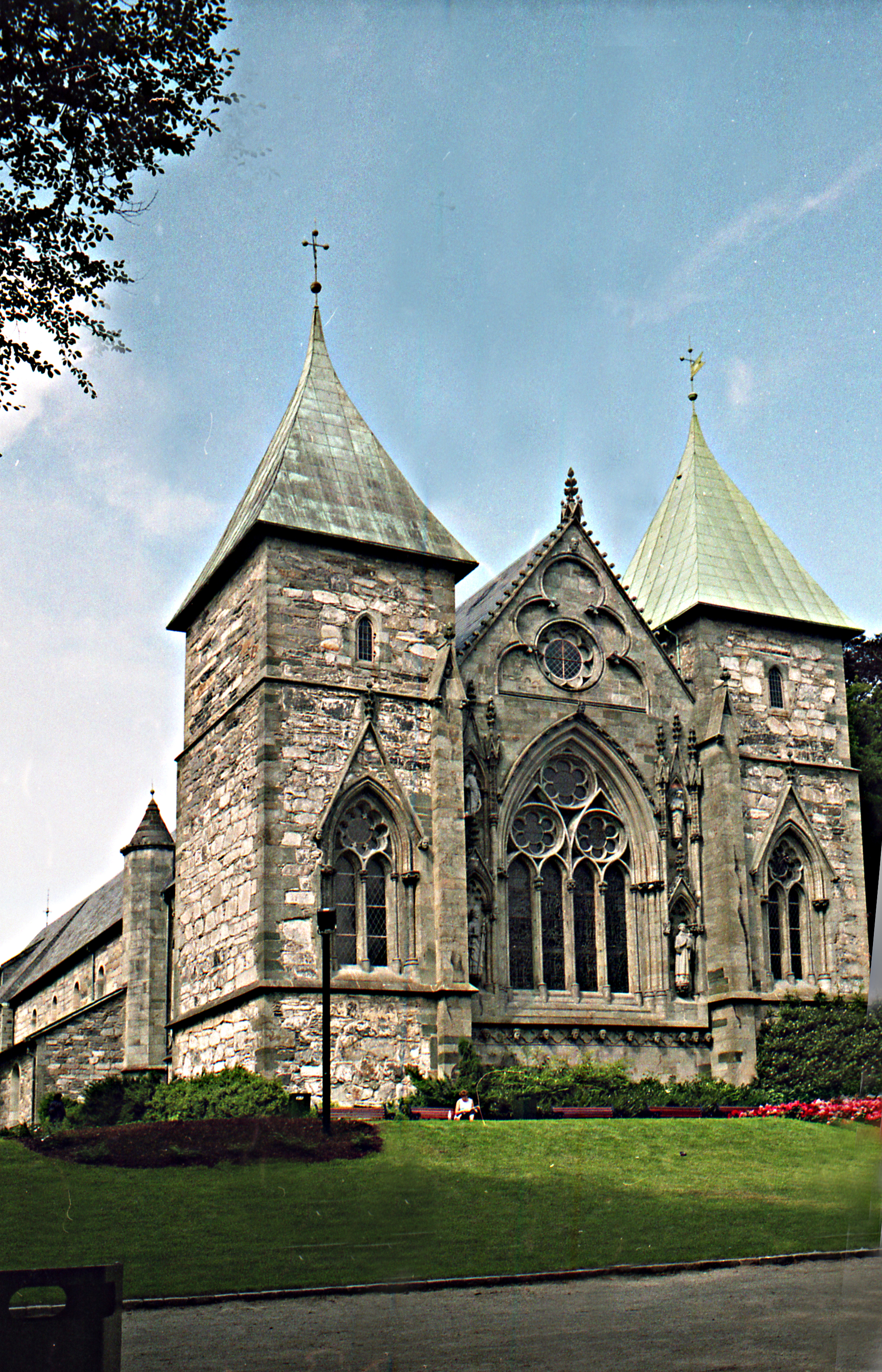 Ставангер.Домкирхе